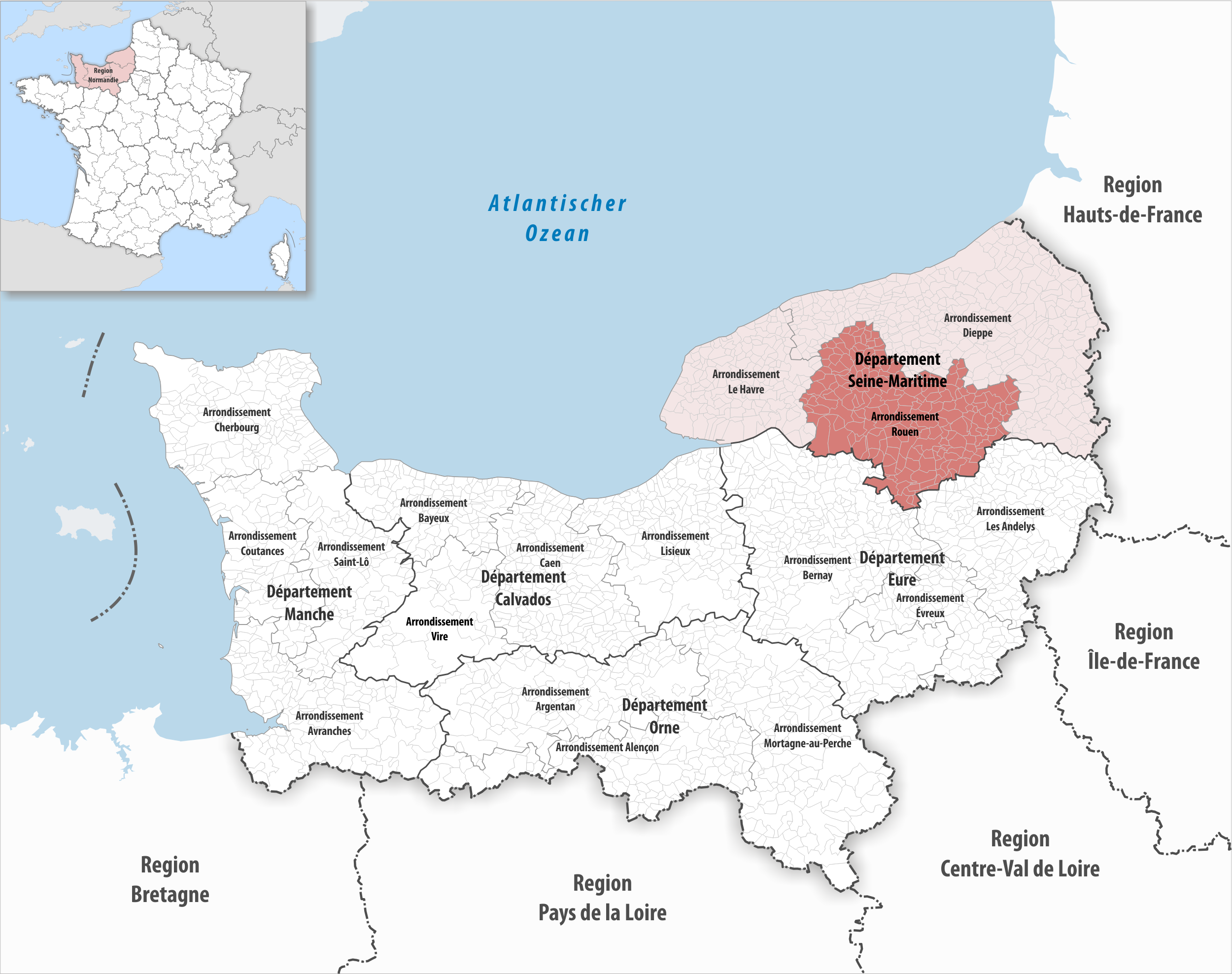 Lage des Arrondissements Rouen